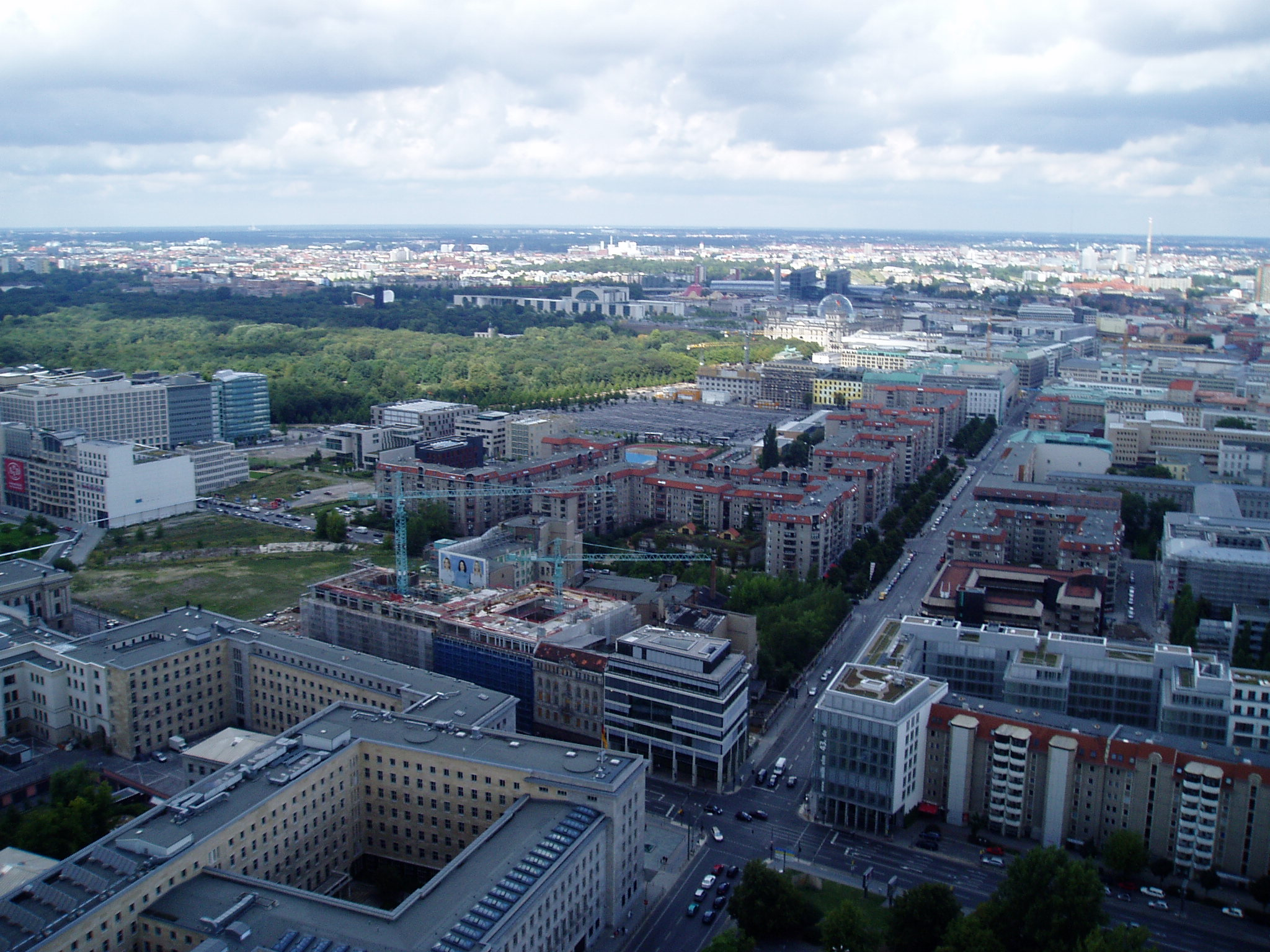 Luftbild der Wilhelmstraße in Berlin-Mitte, aufgenommen vom "Highflyer"-Ballon; vorne links: BMF, im Hintergrund: Tiergarten